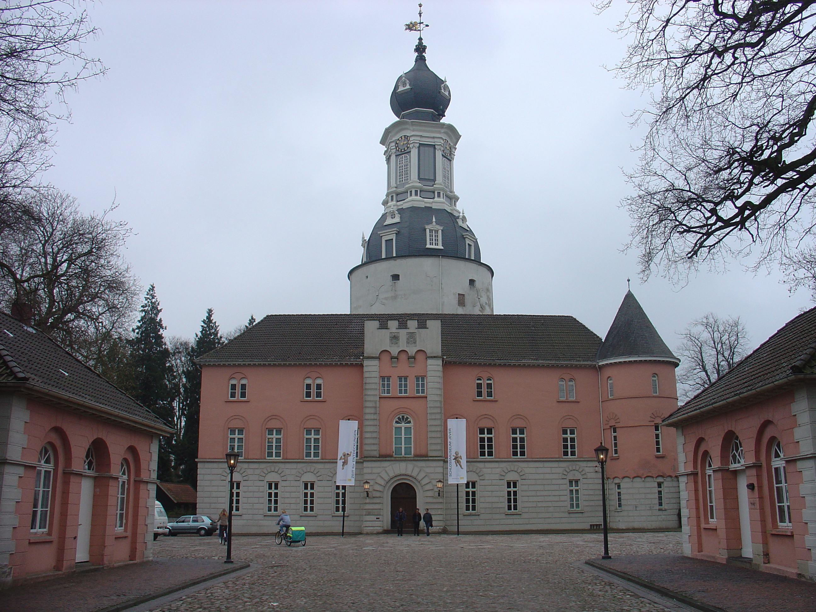 Schloss Jever, Hoffassade